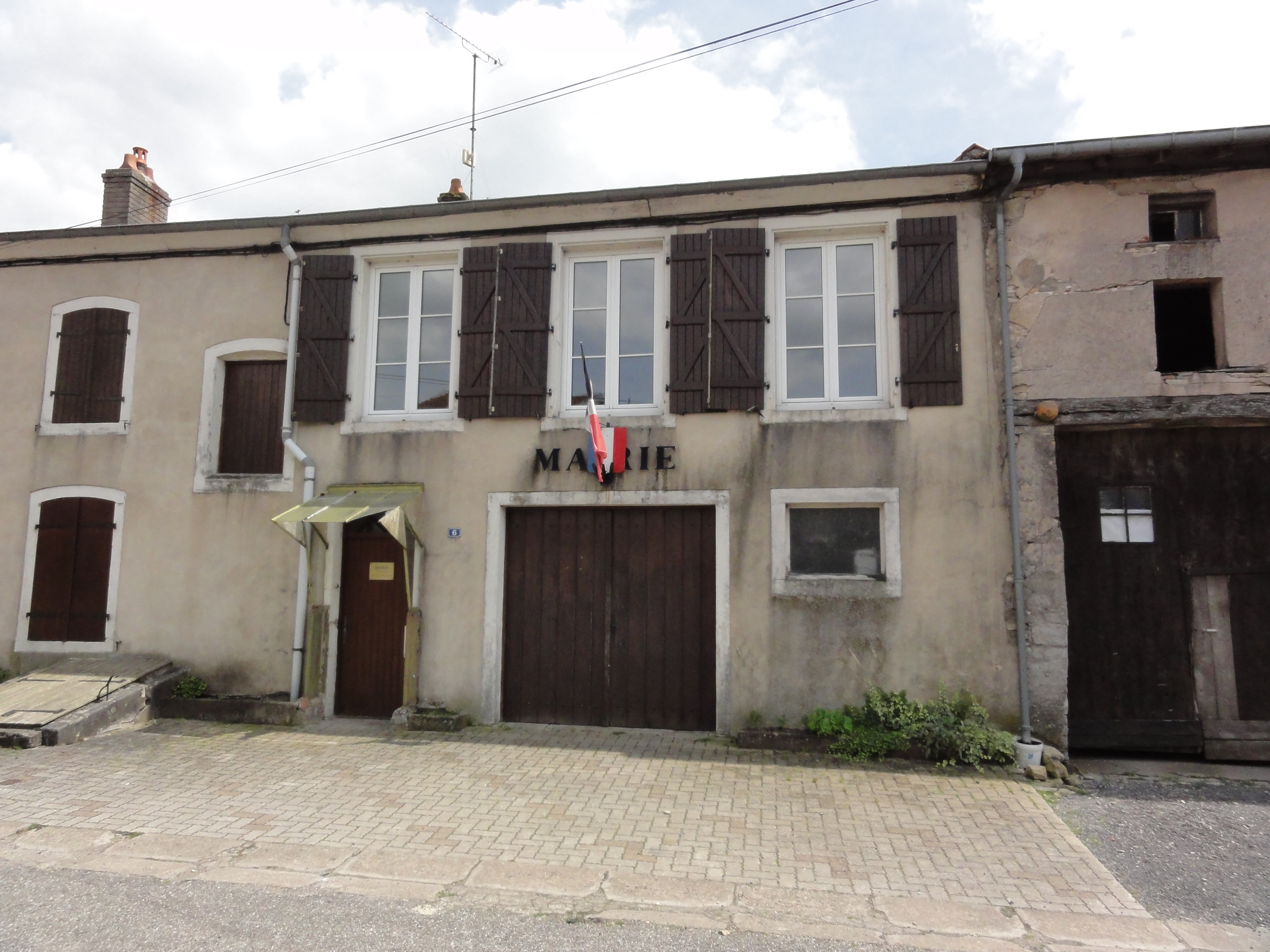 Saint-Germain (M-et-M) mairie